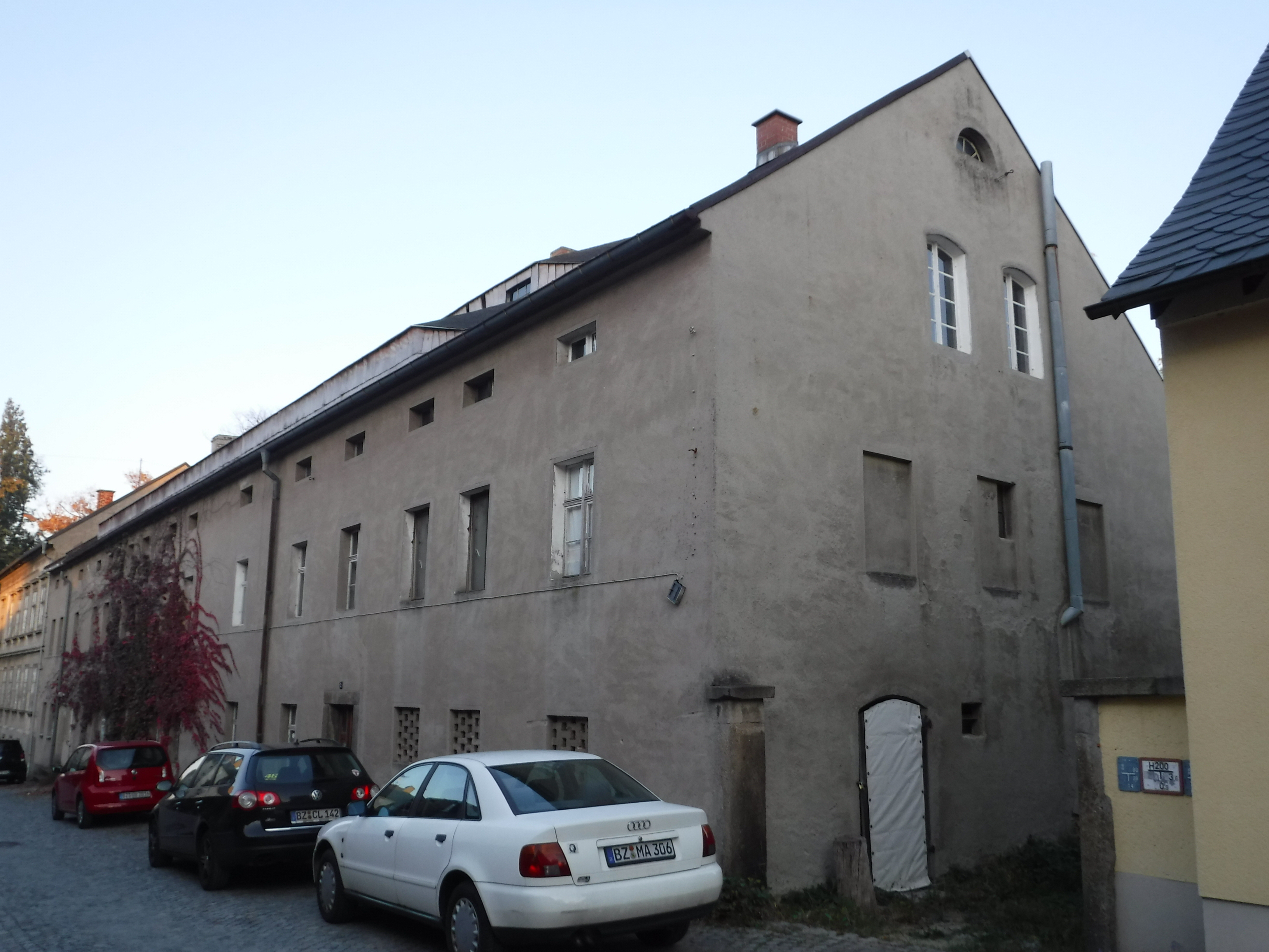 Peter-Buck-Straße 2: Wohnhaus / Kleines Schwesternhaus (Waschhaus) 1795 Einzeldenkmal der Sachgesamtheit Kolonie Kleinwelka; Putzbau mit Drempel und Satteldach, baugeschichtlich und ortsgeschichtlich von Bedeutung. Zweigeschossig, mit Drempel und Hechtgaupe, stark verändert; Ortstermin mit Besichtigung im Inneren hat ergeben, dass Objekt innen weitgehend unverändert erhalten ist.